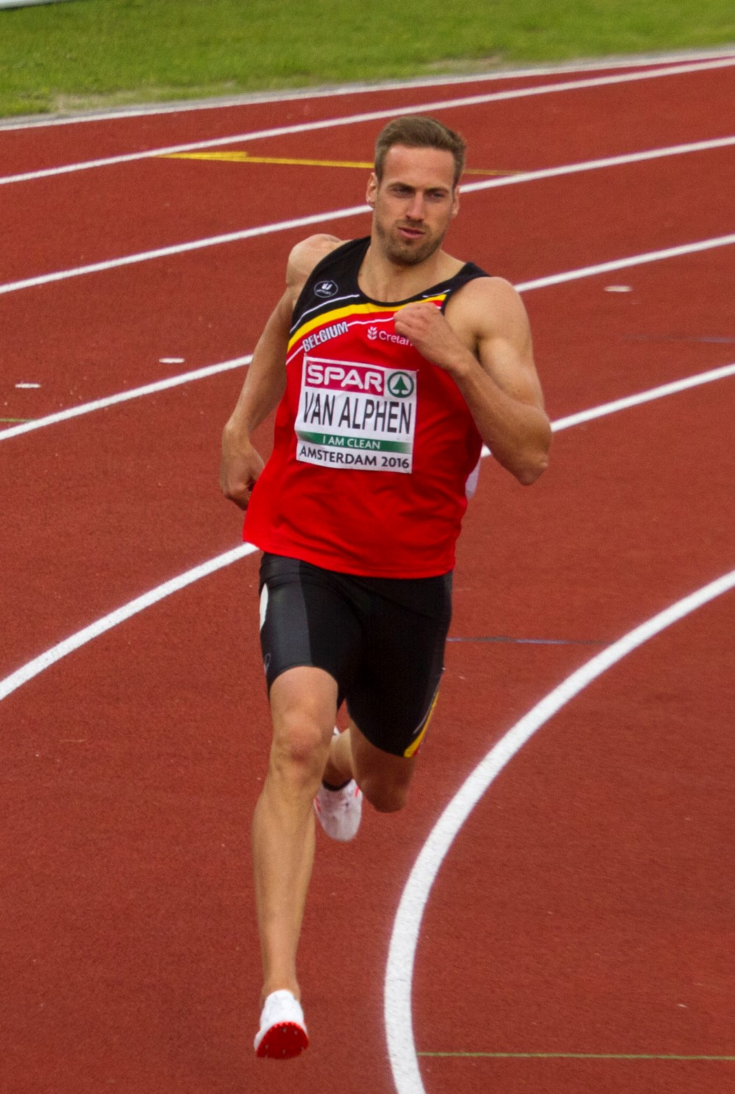 0318 400m tienkamp van alphen